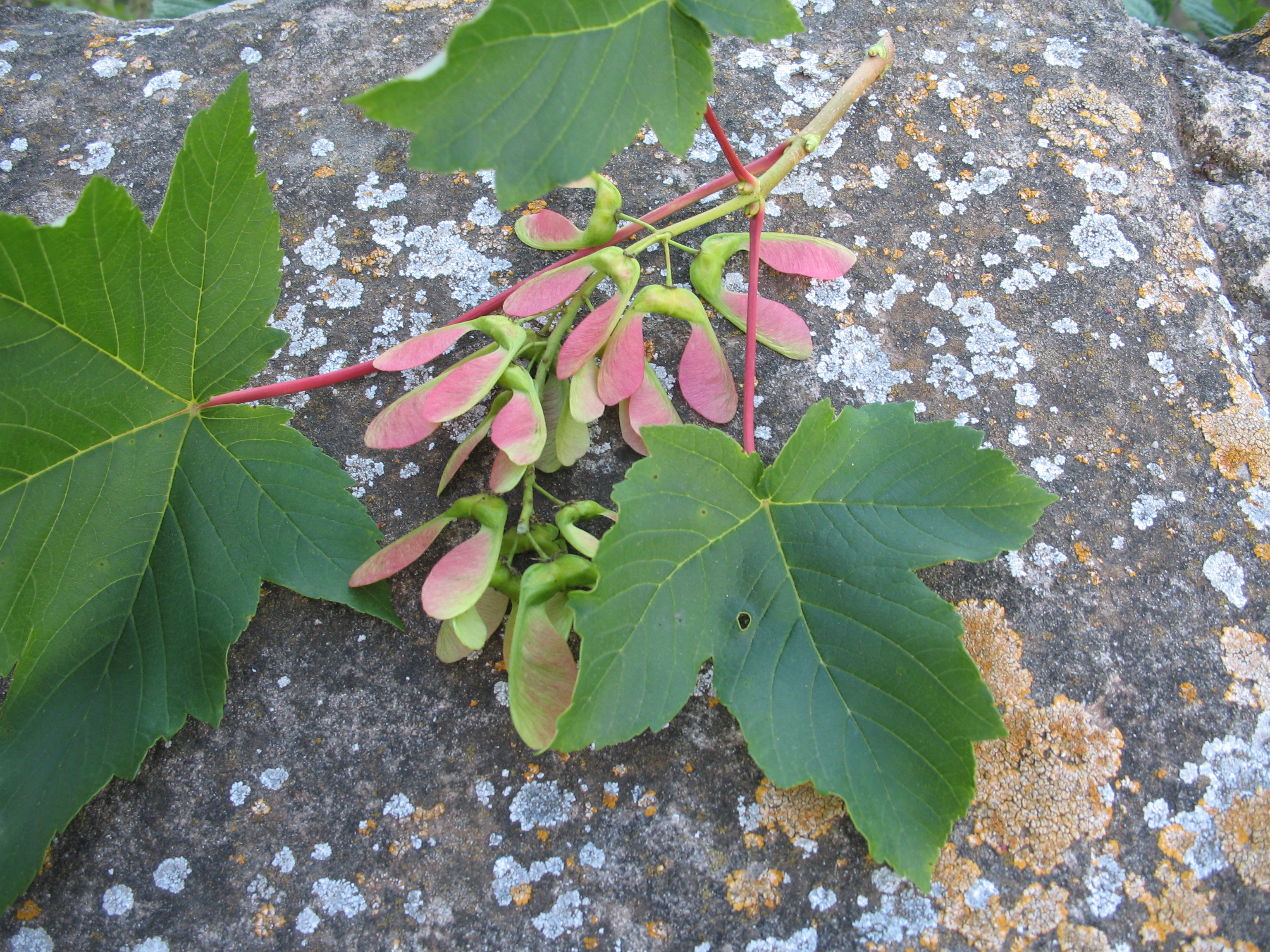 Acer pseudoplatanus samaras (fruits) and leaves. Location: La Garrotxa, Catalonia, Spain